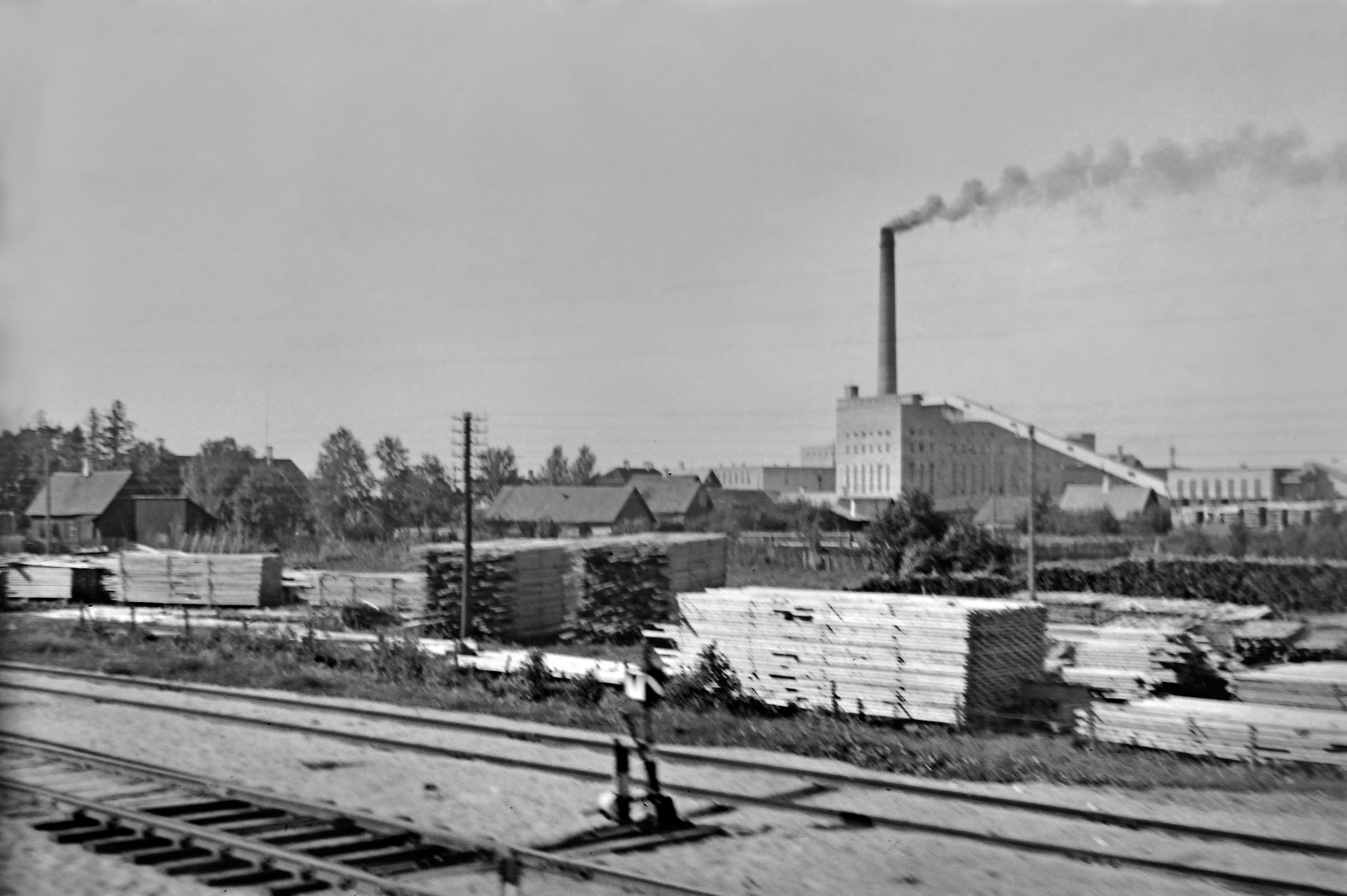 Kehra tselluloositehas